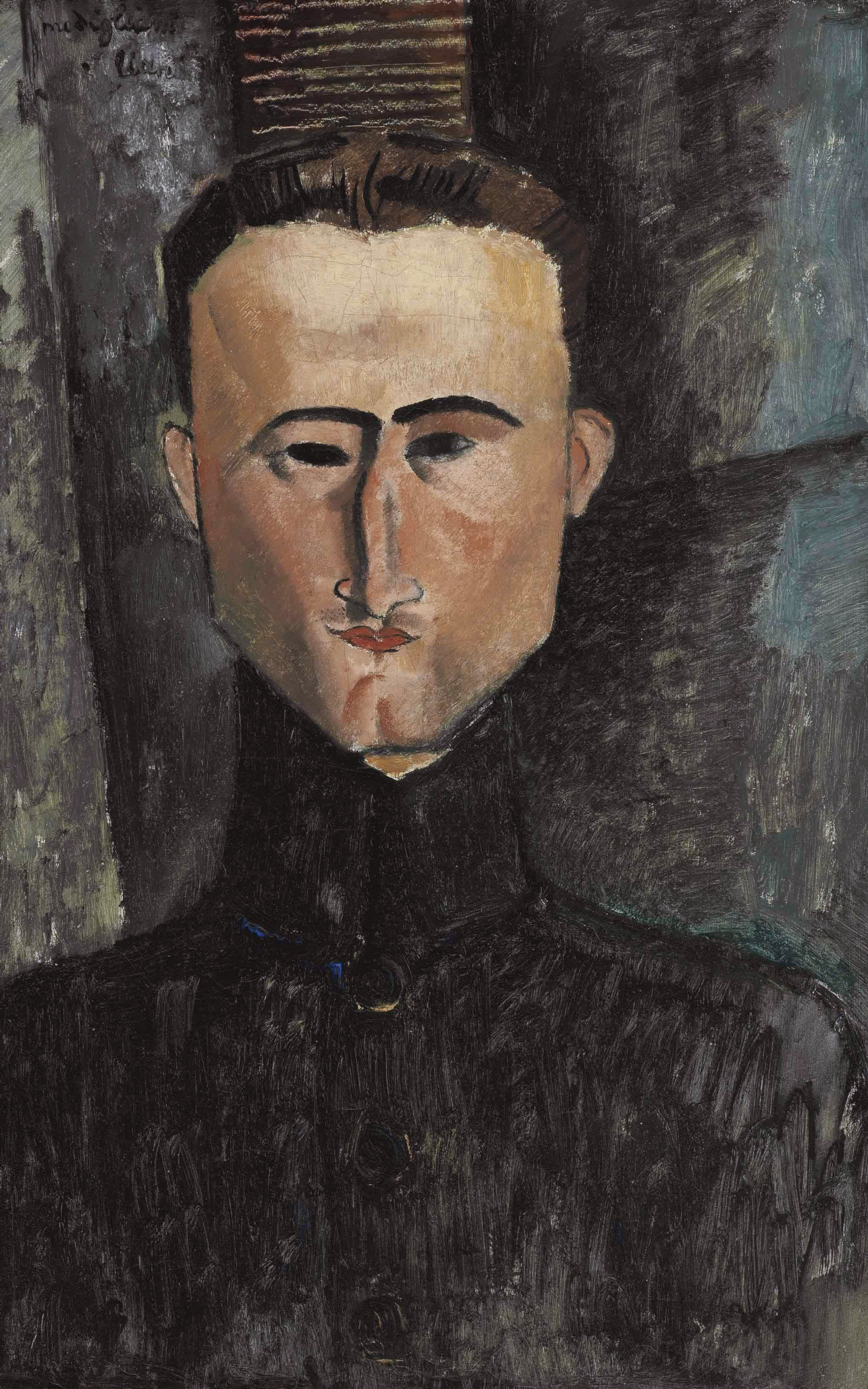 André Rouveyre